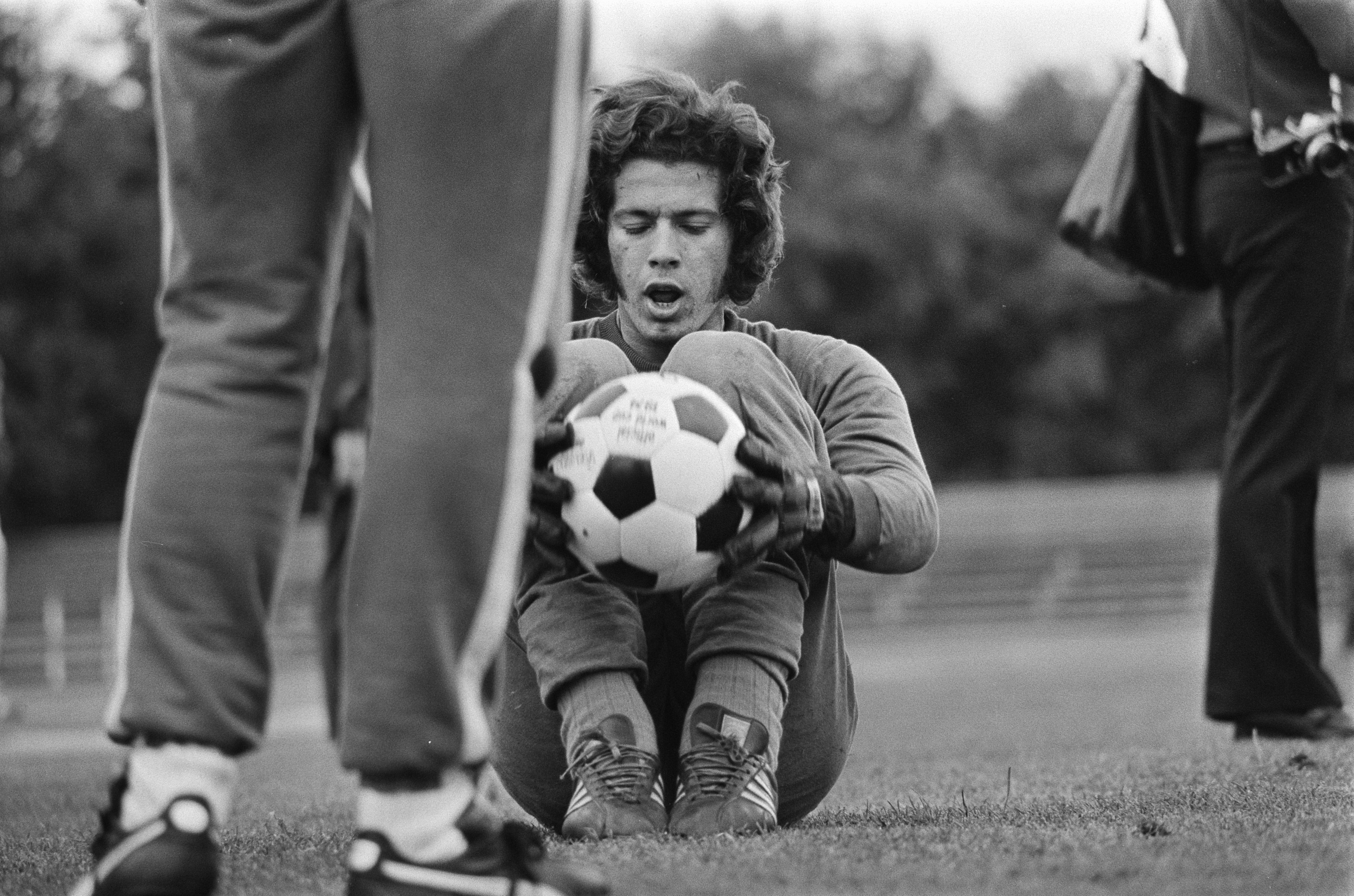 Collectie / Archief : Fotocollectie Anefo Reportage / Serie : [ onbekend ] Beschrijving : WK 74, training Brazilie; keeper E. Leao tijdens training Datum : 1 juli 1974 Locatie : Duitsland Trefwoorden : sport, trainingen, voetbal Persoonsnaam : Leao Fotograaf : Mieremet, Rob / Anefo Auteursrechthebbende : Nationaal Archief Materiaalsoort : Negatief (zwart/wit) Nummer archiefinventaris : bekijk toegang 2.24.01.05 Bestanddeelnummer : 927-2955